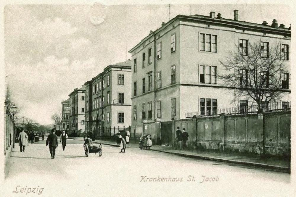 Das Hauptgebäude des Städtischen Krankenhauses St. Jakob in Leipzig